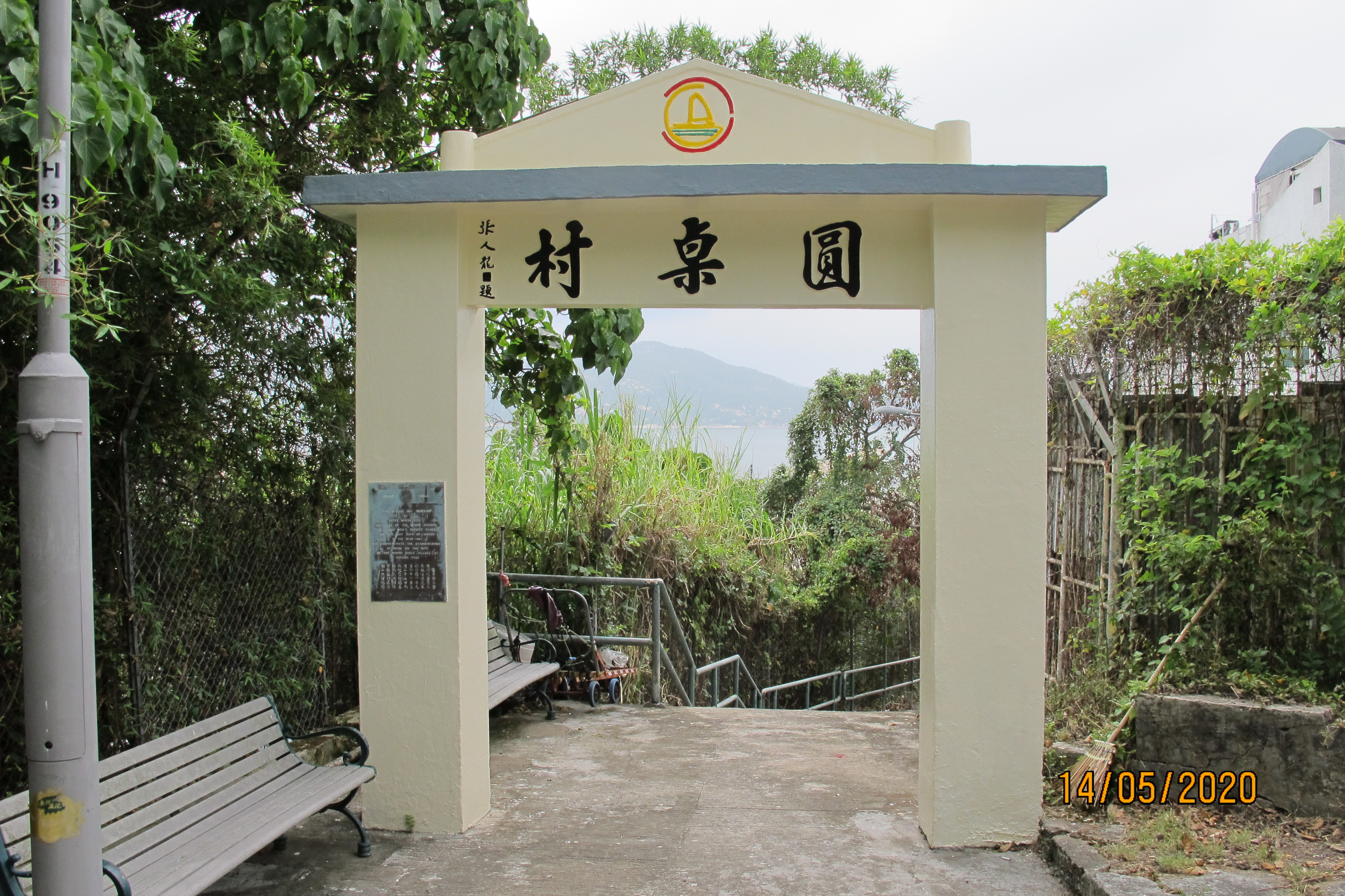 圓桌一村入口牌坊及動土碑記